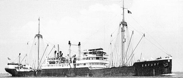 Das Motorschiff ERFURT des NDL 1923